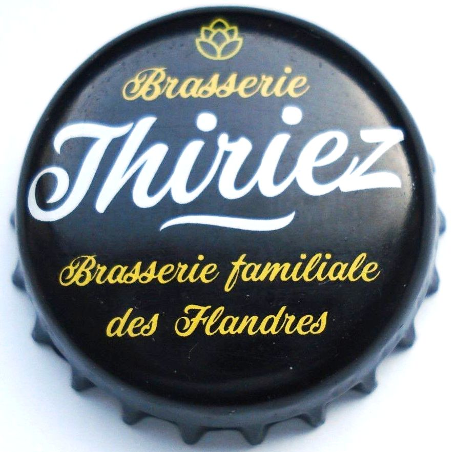 Capsule de bière française Thiriez (Nord)